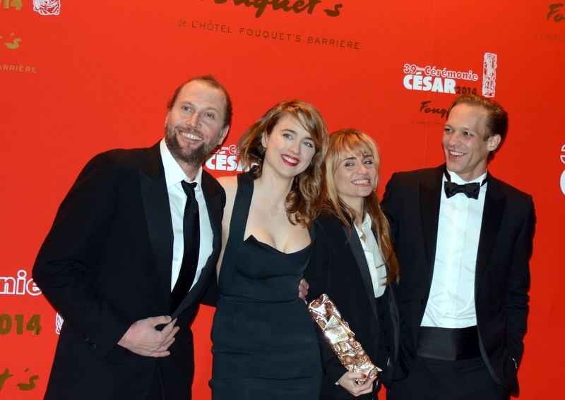 L'équipe du film "Suzanne" : François Damiens, Adèle Haenel, Katell Quillévéré et Paul Hamy à la cérémonie des César